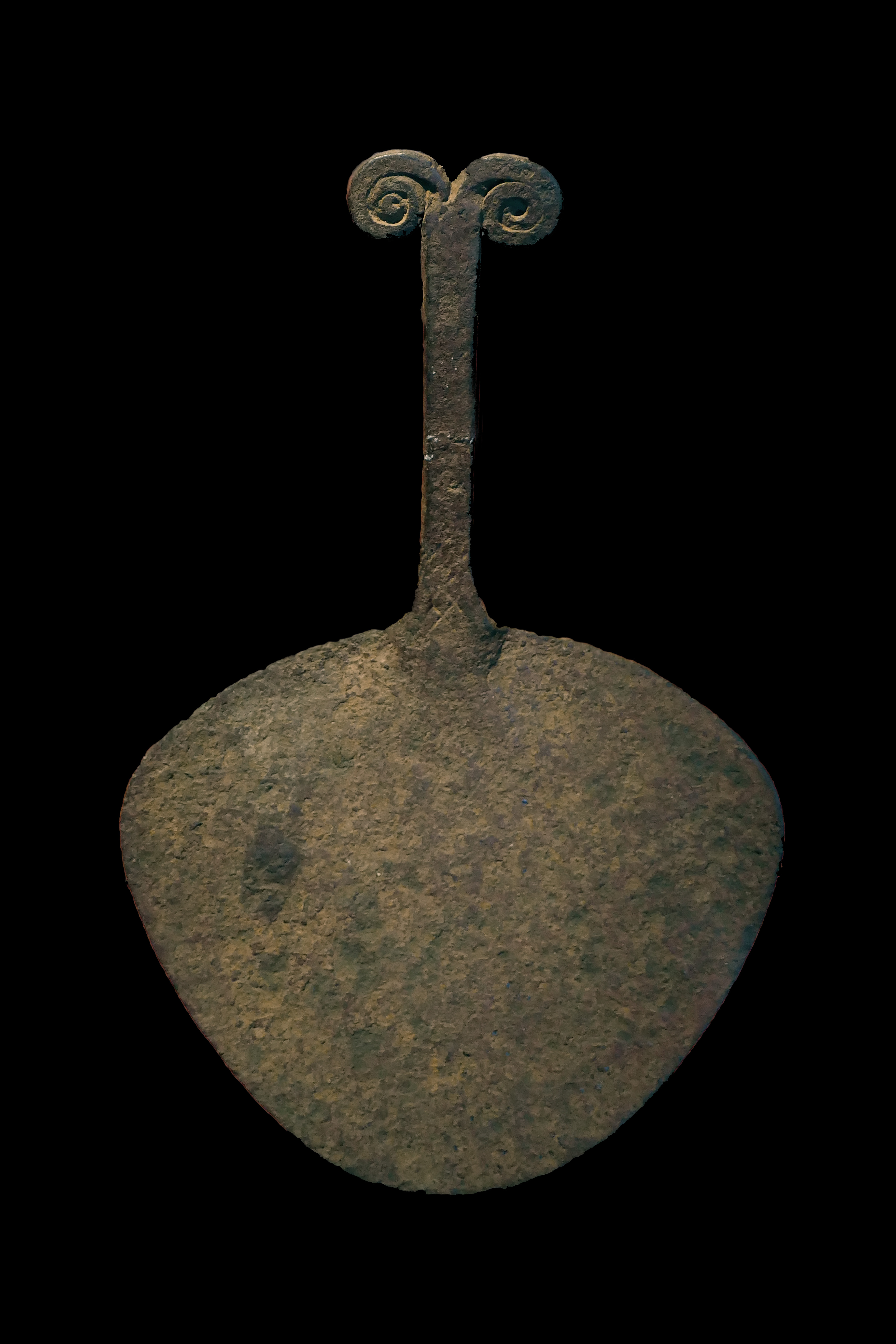 Lame de houe rituelle (jəm ban) utilisée par les femmes Population Chamba (Nigeria) Artiste inconnu 20e s. Fer Collection particulière Objet présenté lors de l'exposition Frapper le fer. L'art des forgerons africains au musée du quai Branly Jacques Chirac.